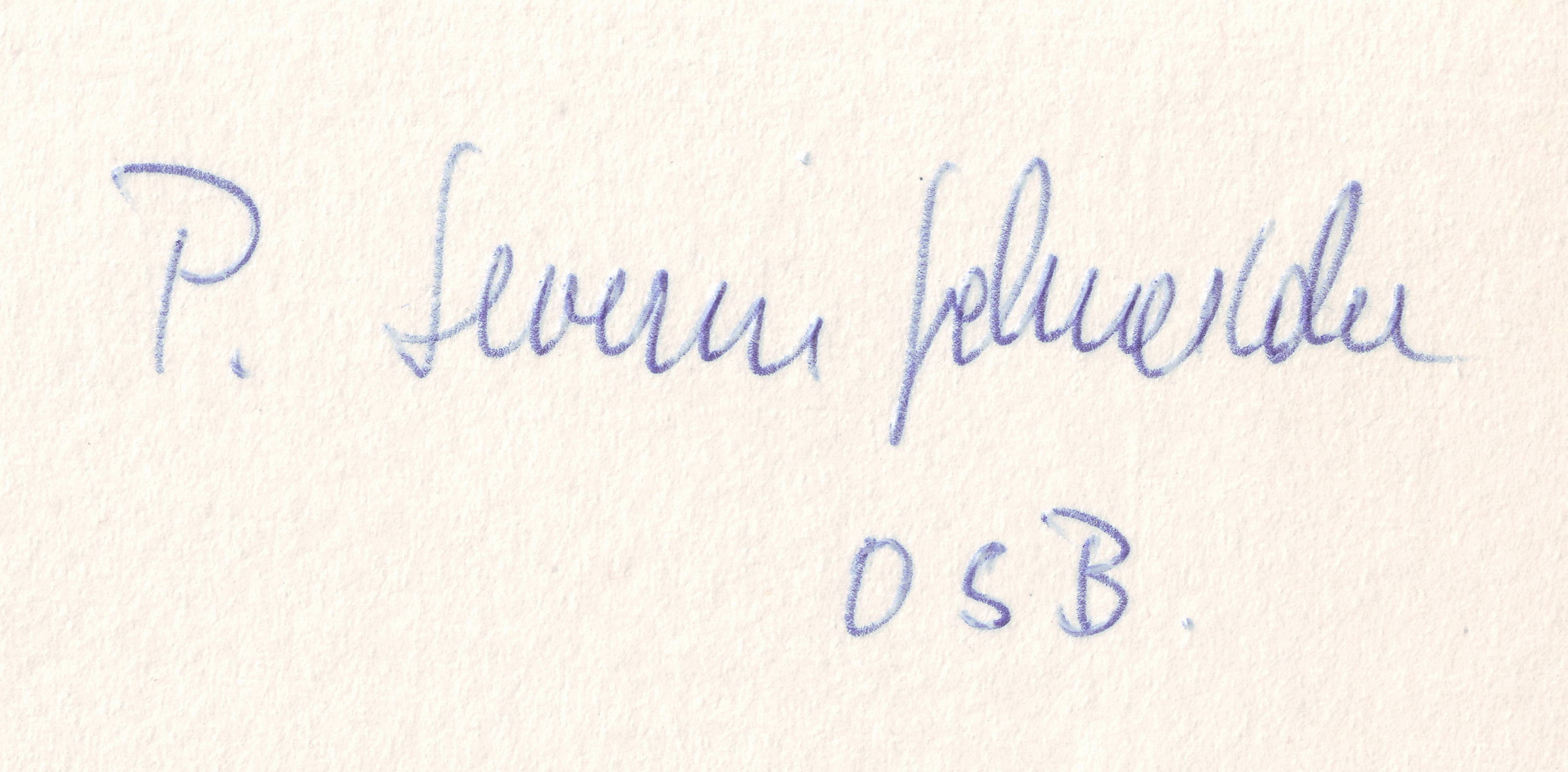 P. Severin Schneider OSB, Unterschrift 1978